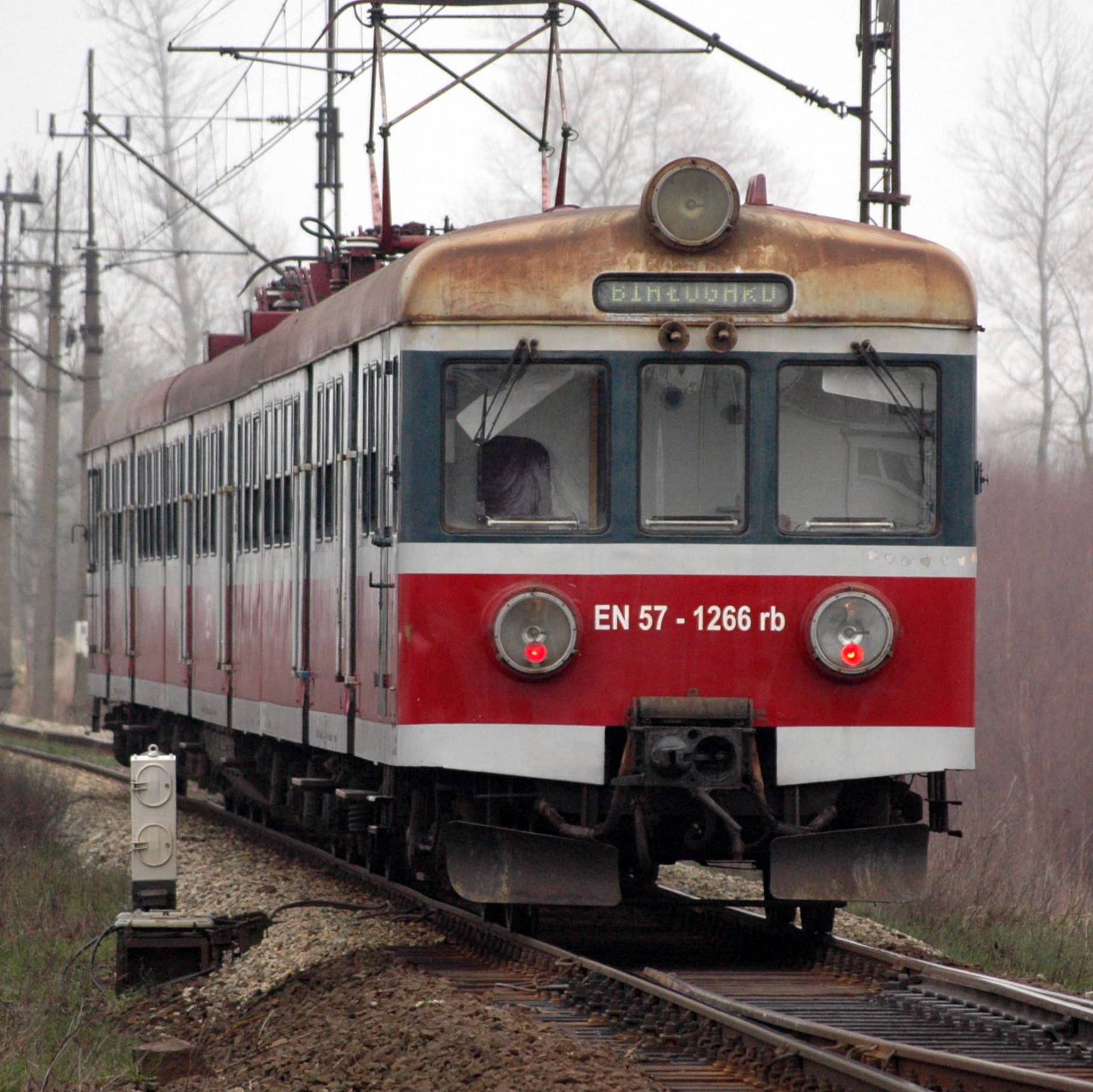 EN57 w Dygowie.